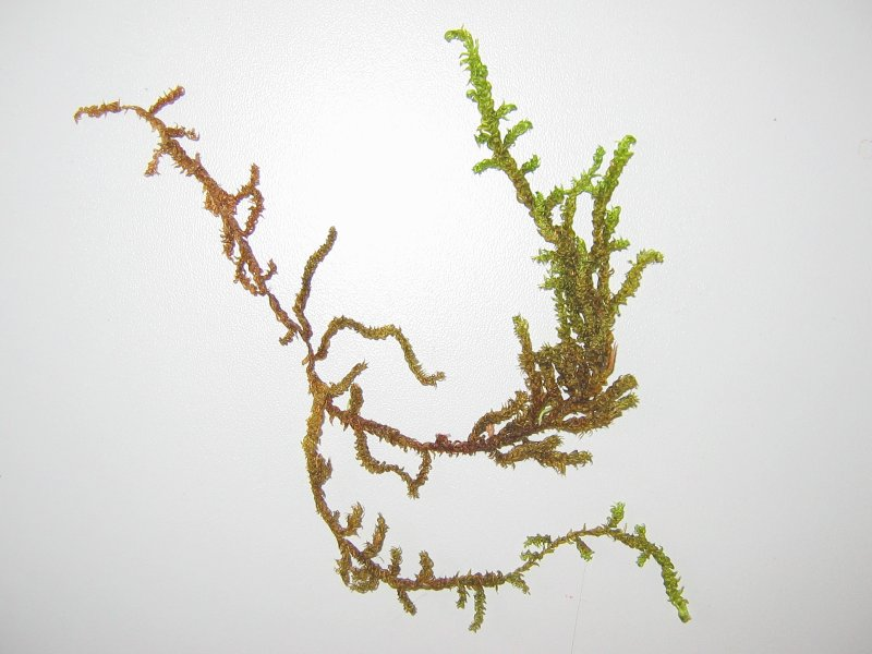 Echtes Skorpionsmoos (Scorpidium scorpioides)